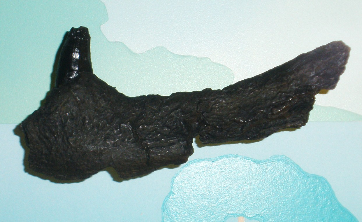 Fossil of Bergisuchus, an extinct crocodile- Took the photo at Senckenberg Museum of Frankfurt